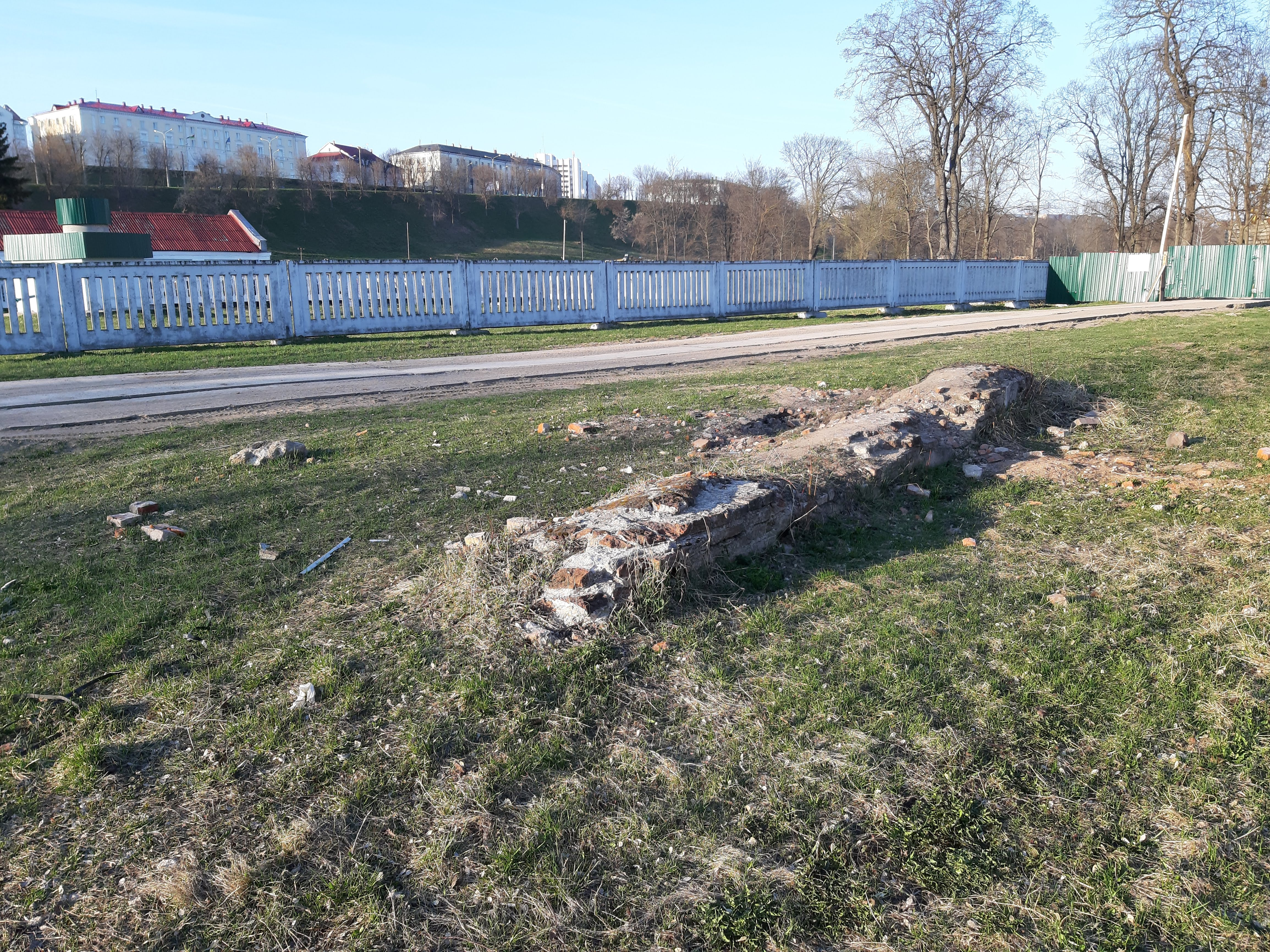 Магілёў. Рэшткі касцёла Святога Антонія Падуанскага